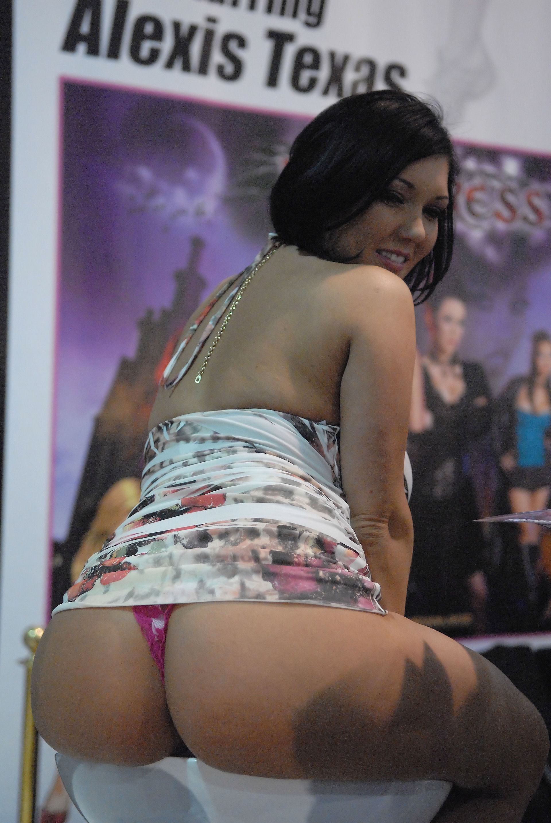 Claire Dames en Las Vegas.